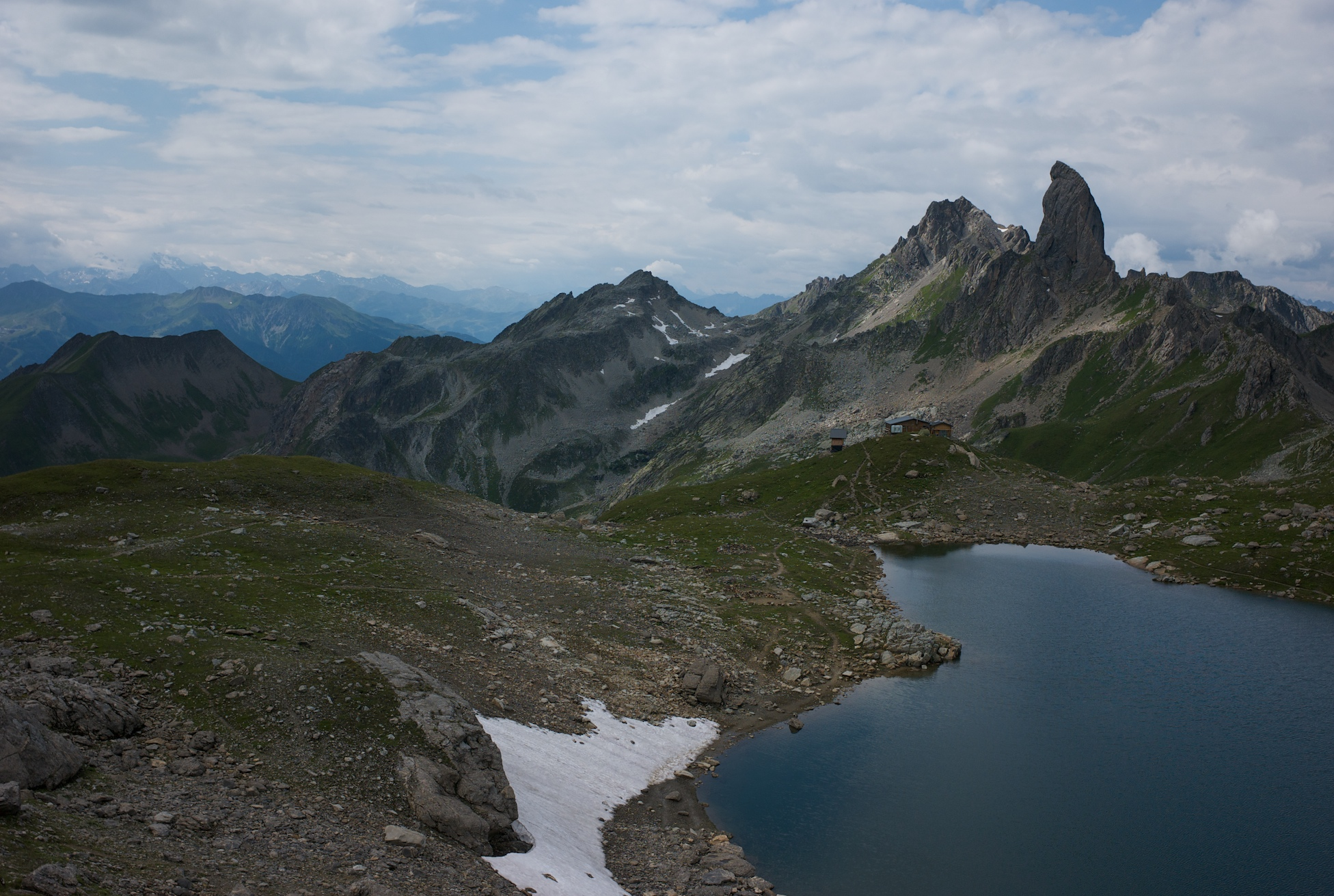 Refuge de Presset, Savoie, France